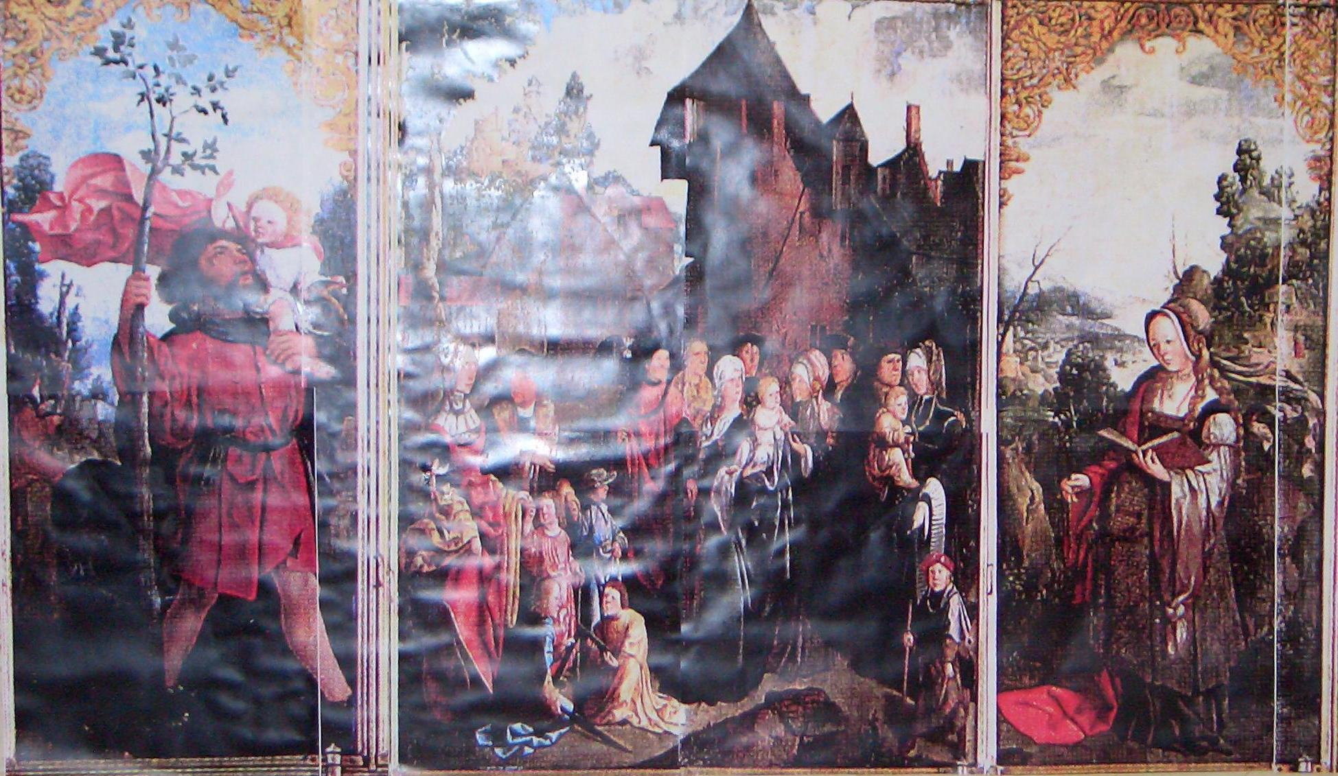 Altarbild in der Pfarrkirche St. Martin zu Obervellach im Mölltal. Gemalt wurde dieses Bild vom niederländischen Maler Jan van Scorel. Der Altar zeigt im Rechten Flügel den Heiligen Christophorus im linken Flügel die Heilige Appolonia und im Mittelteil die Sippe Christi (hinter dem Jesuskind in der Bildmitte hat sich Scorel, schwarz gekleidet, selbst dargestellt) mit der Burg Falkenstein.